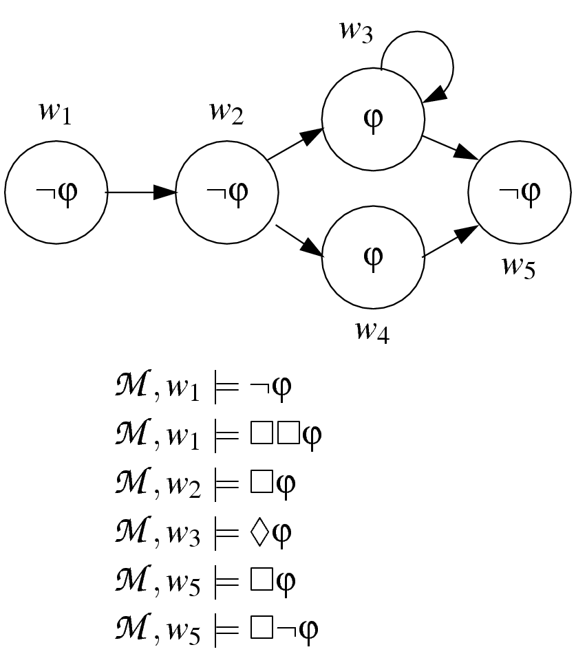 Kripke semantics example